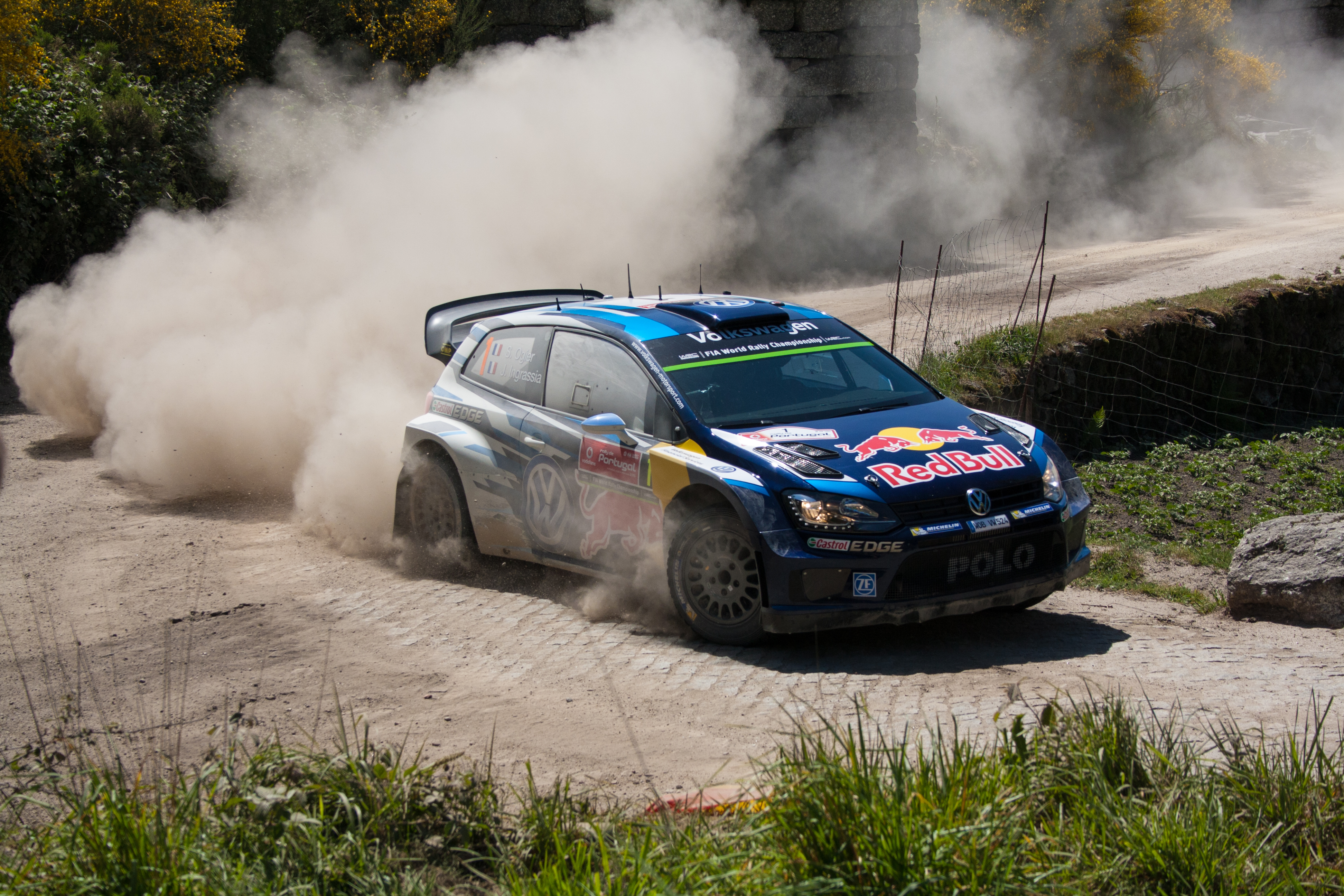 S. Ogier - J. Ingrassia